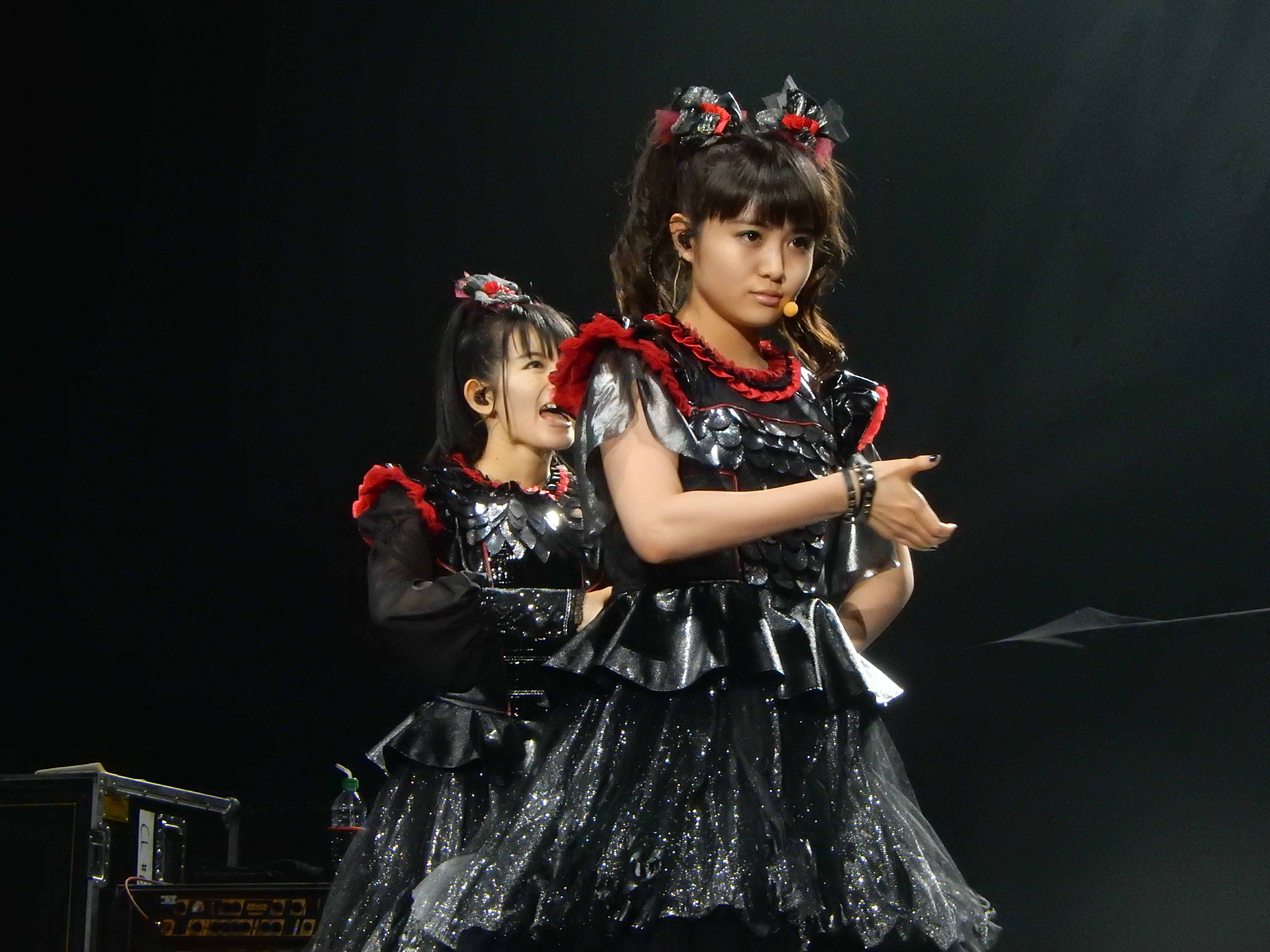 BABYMETAL, O2 Arena, London